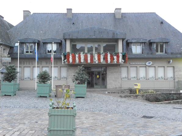 Mairie de Bazouges-la-Pérouse (35)